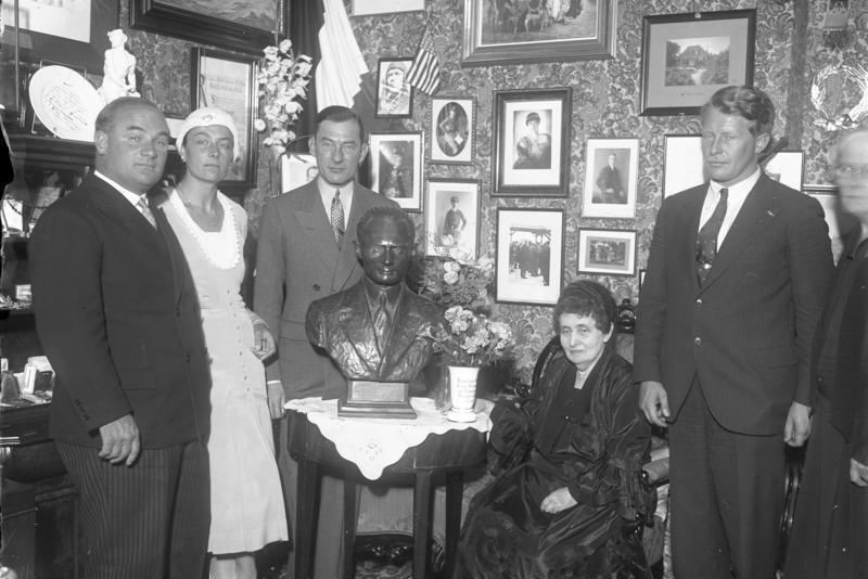 Der Oberbürgermeister von New York, Jimmy Walker ehrt die Mutter des Ozeanfliegers von Hünefeld durch einen Besuch! Der New Yorker Oberbürgermeister Jimmy Walker (Mitte) hinter der Büste des Verstorbenen und die Mutter im Erinnerungszimmer des Ozeanfliegers Freiherrn von Hünefeld in Berlin-Südende. Von links nach rechts: der berühmte deutsche Ozeanflieger Hptm. Köhl und Gattin, der Oberbürgermeister von New York Jimmy Walker, Freifrau von Hünefeld, die Mutter des Verstorbenen, der bekannte amerikanische Polflieger Bert Balchen.